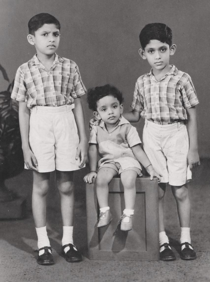 Photograph of Neranjan Wijeyeratne, Mano Wijeyeratne & Anuradha Dullewe Wijeyeratne